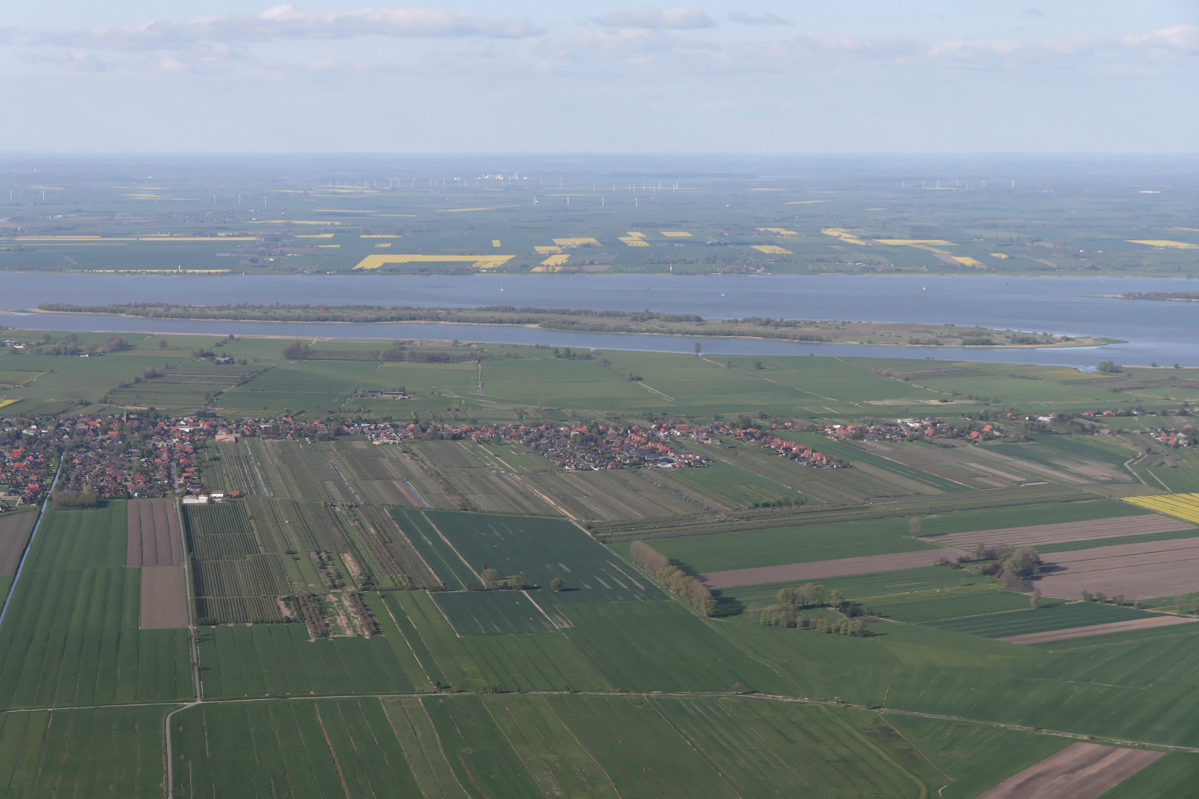 Blick von Süüdsüüdwesten op Aßel mit de Elv un Swarttünnensand in'n Achtergrund. An'n rechten Rand Barnkroog, an'n linken Rand Drochters.